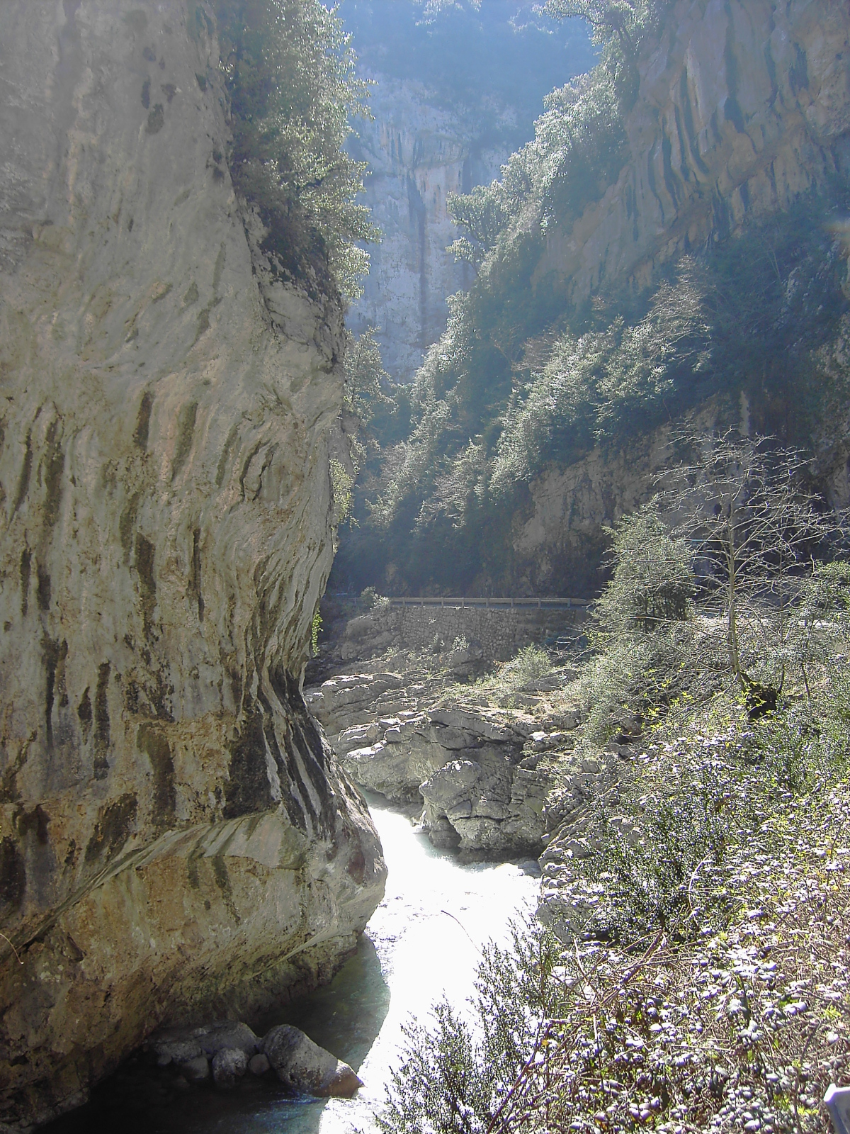 El Cañón del Vellos, conocido por los autóctonos como Congosto d'as Cambras, es un paraje natural espectacular vinculado al Parque Nacional de Ordesa y Monte Perdido